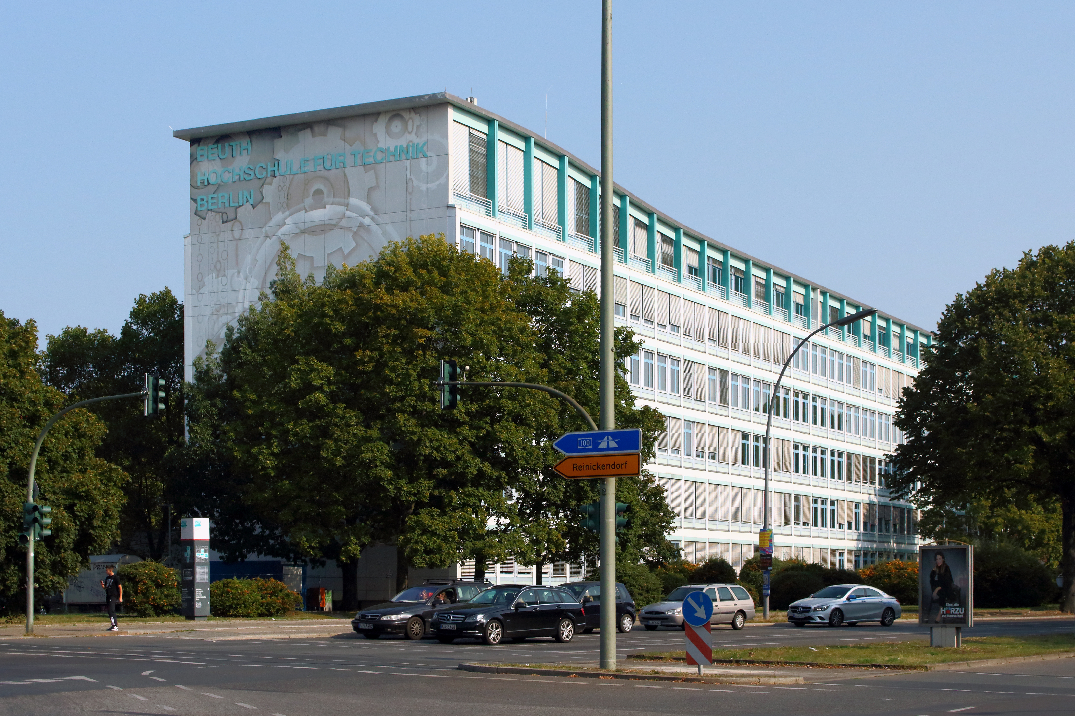 Gebäude der Beuth Hochschule für Technik Berlin, Ansicht aus Richtung U Amrumer Straße